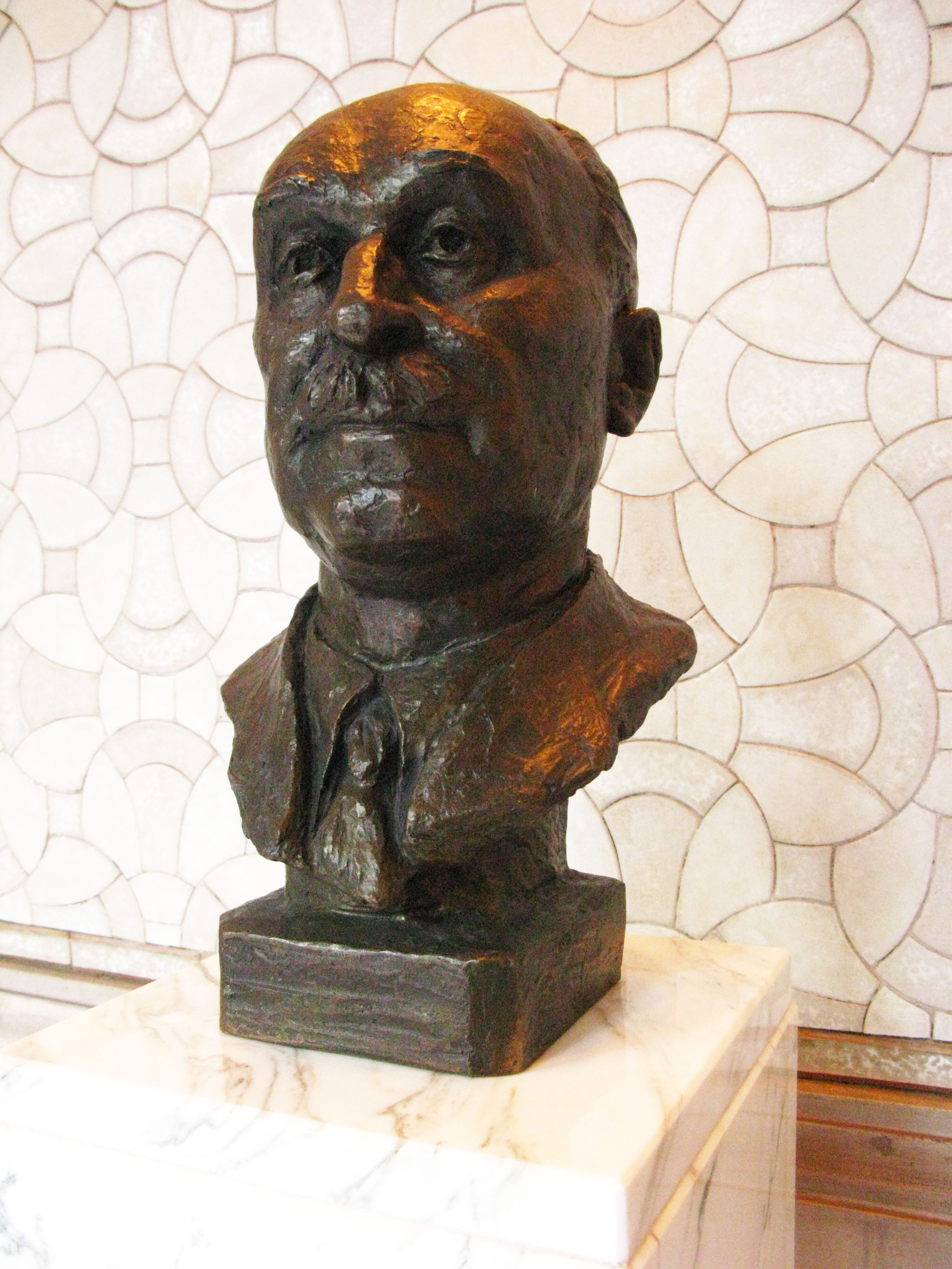 Buste de Jean Monnet se trouvant dans le Palais de la Paix Peace Palace Den Haag The Hague La Haye